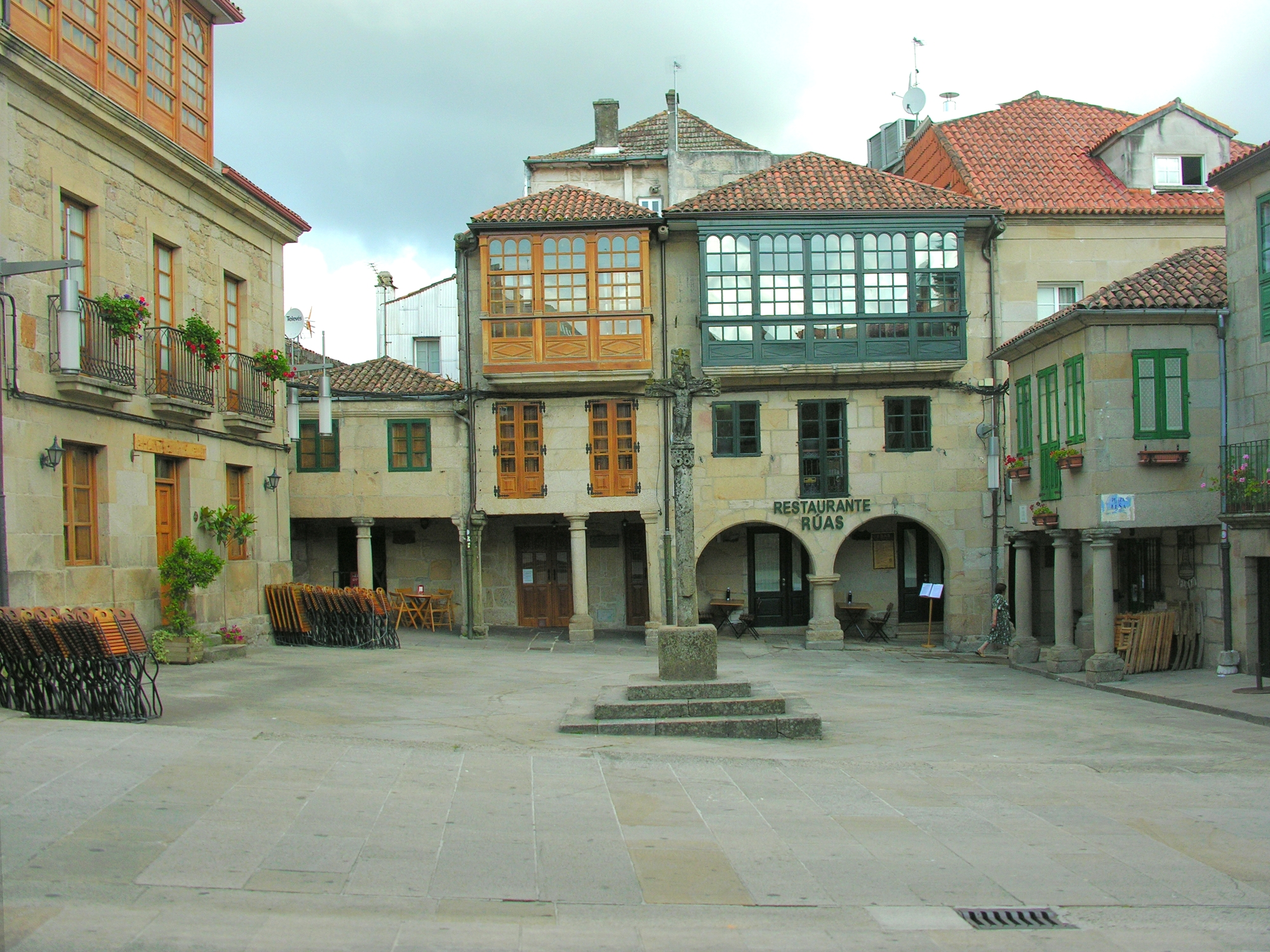 Praza da leña, antigamente Eirado da leña. Pontevedra, Galicia Publish by= Luis Miguel Bugallo Sánchez.